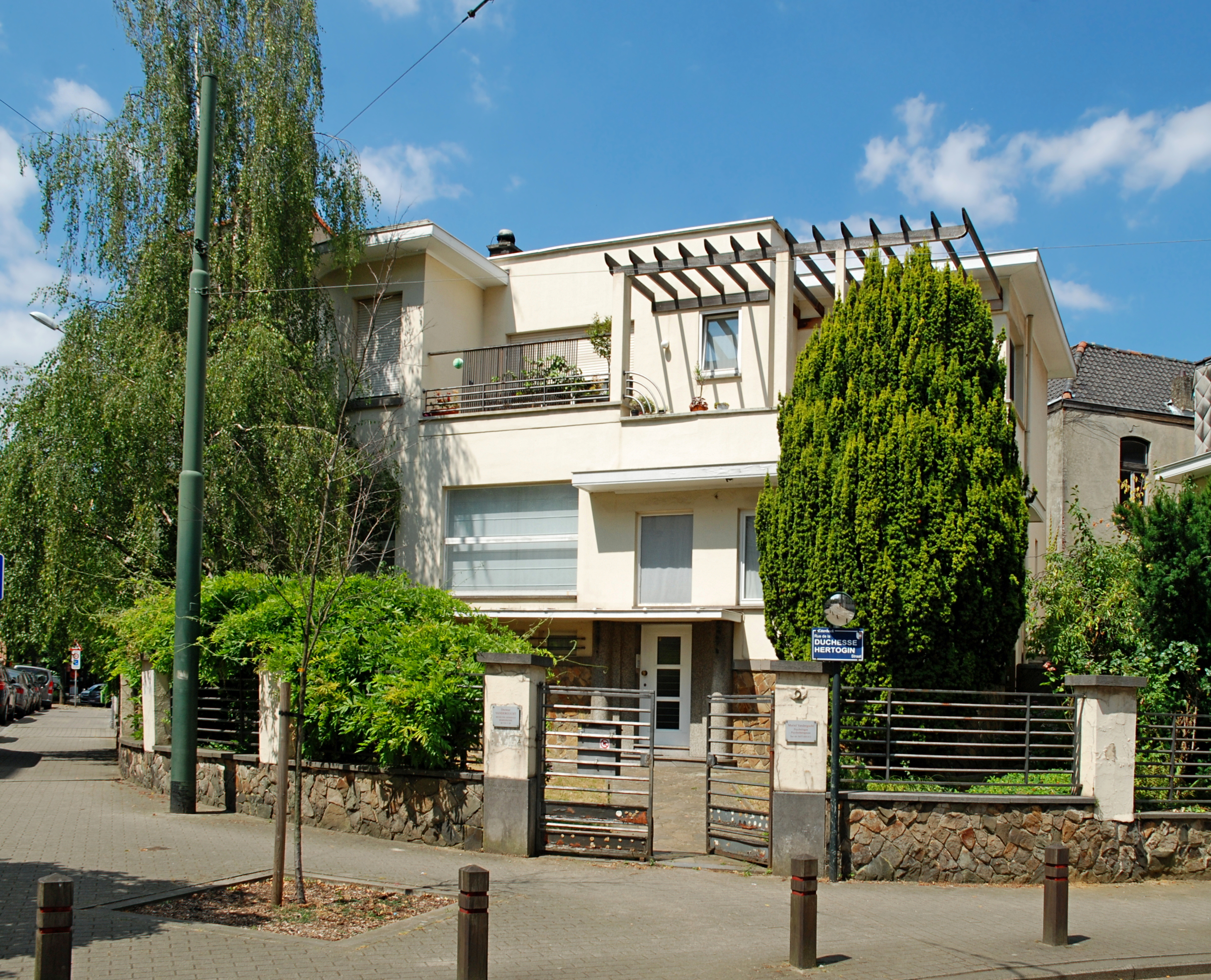 Belgique - Bruxelles - Rue de la Duchesse 2 (modernisme - Léon Emmanuel Govaerts et Alexis Van Vaerenbergh - 1932)